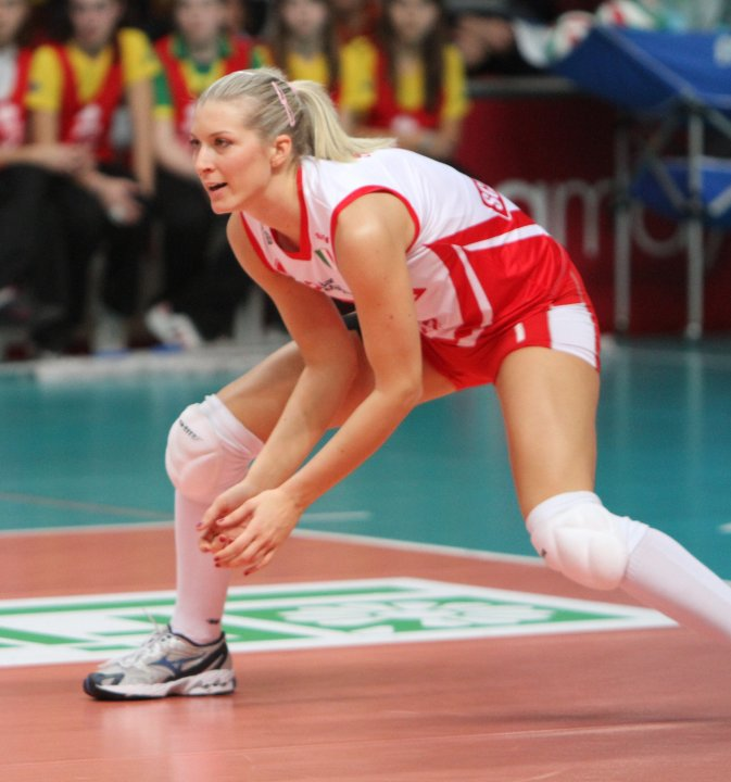 Senna Usić, pallavolista croata, gioca nel ruolo di schiacciatrice